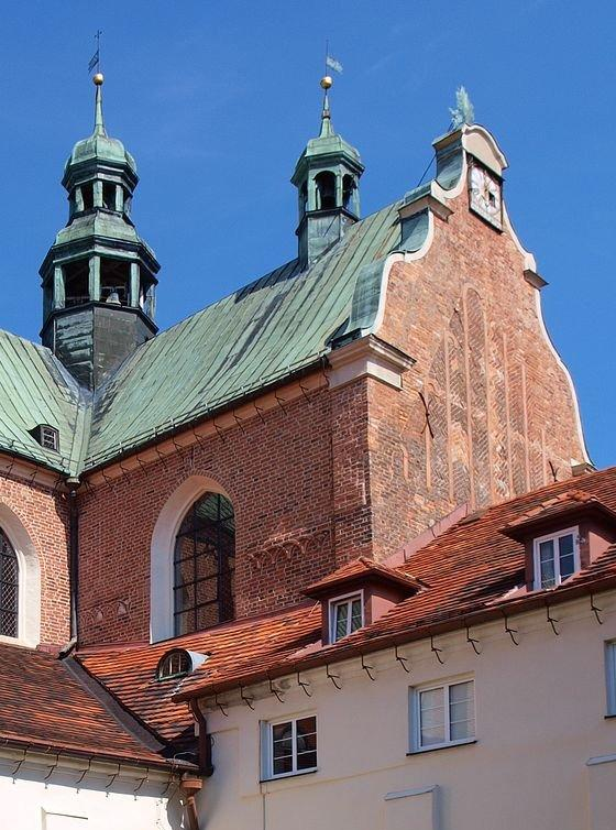 Widok z wirydarza.